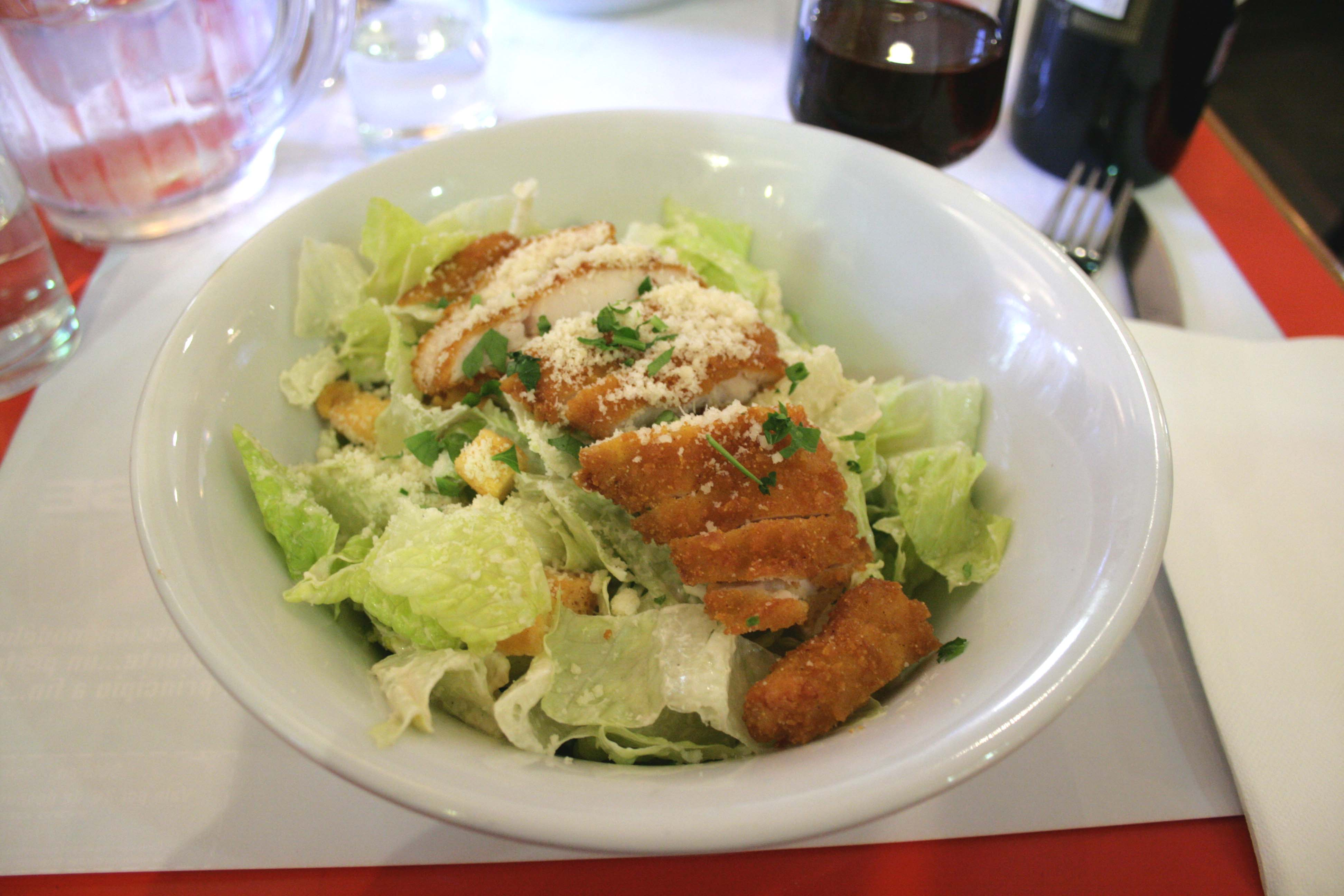 Ensalda Cesar